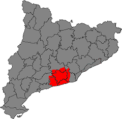 Àrea de la Denominació d'Origen Penedès